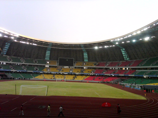 Stade olymique de Brazzaville en 2015